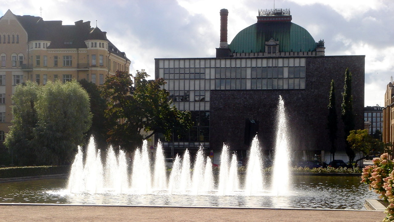 Kaisaniemenpuiston puolella sijaitseva Pieni Näyttämö. Edessä suihkulähde